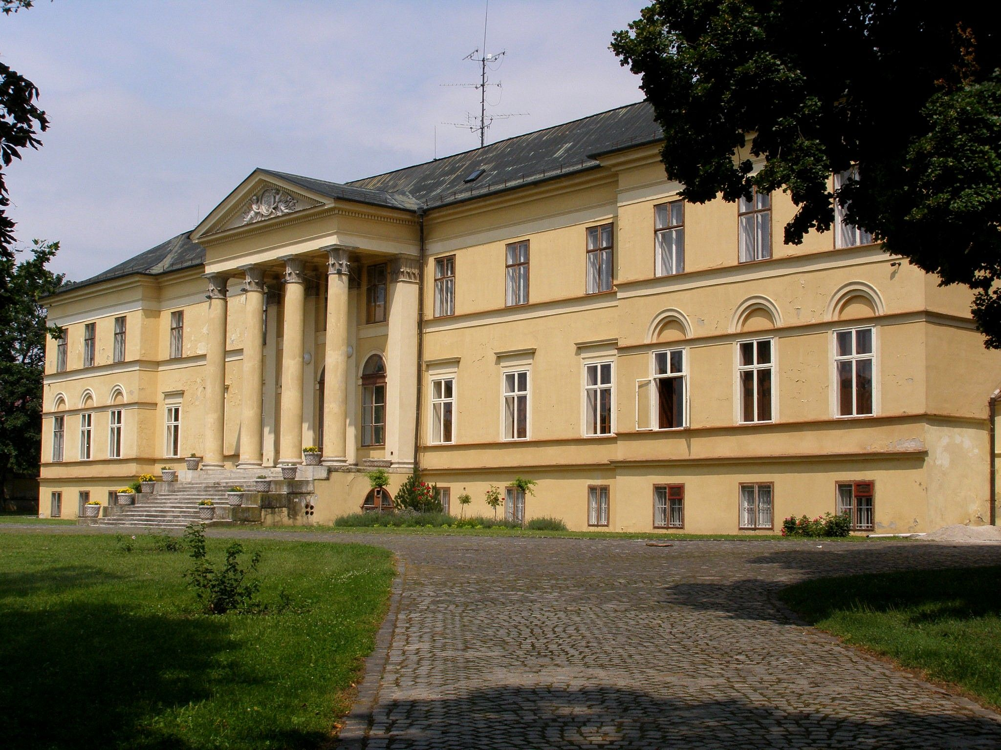 Priečelie kaštieľa z parku